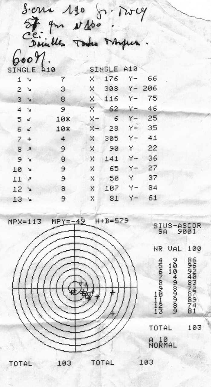 Résultat d'un tir à la distance de 600m.Le tir reste dans un groupement de 10cms.